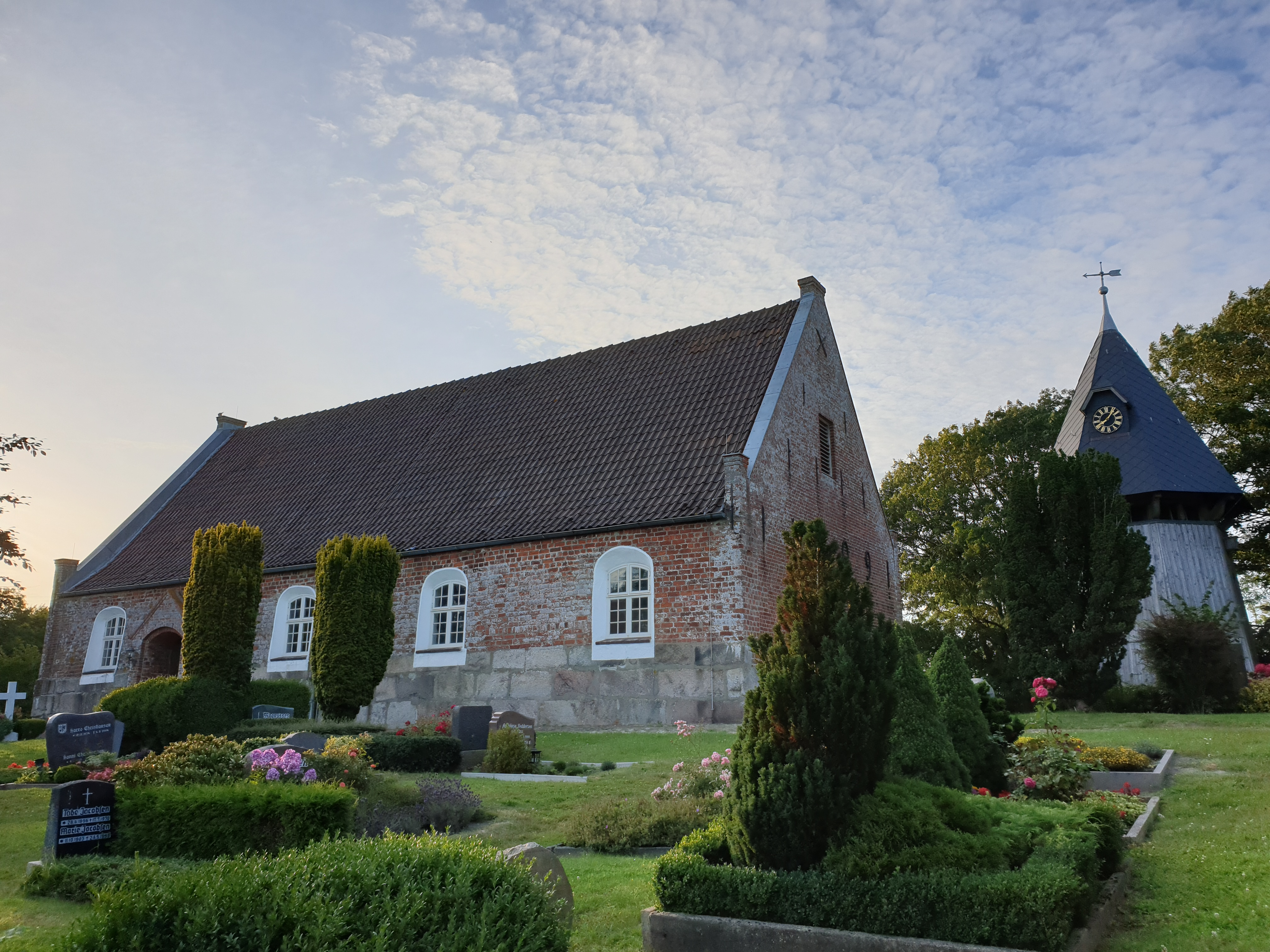 Kirche in Ockholm mit Glockenstapel